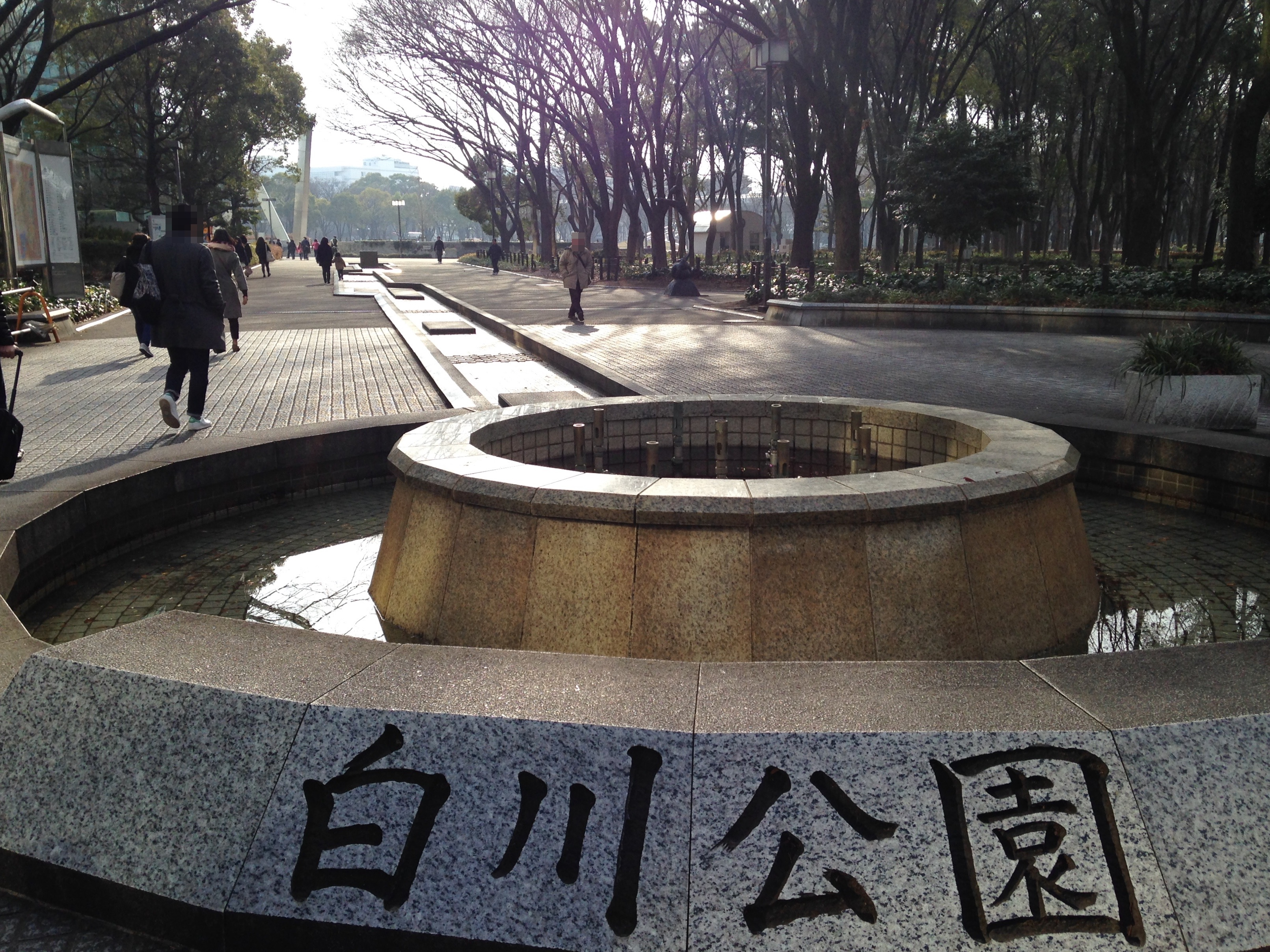 白川公園の北西側入り口